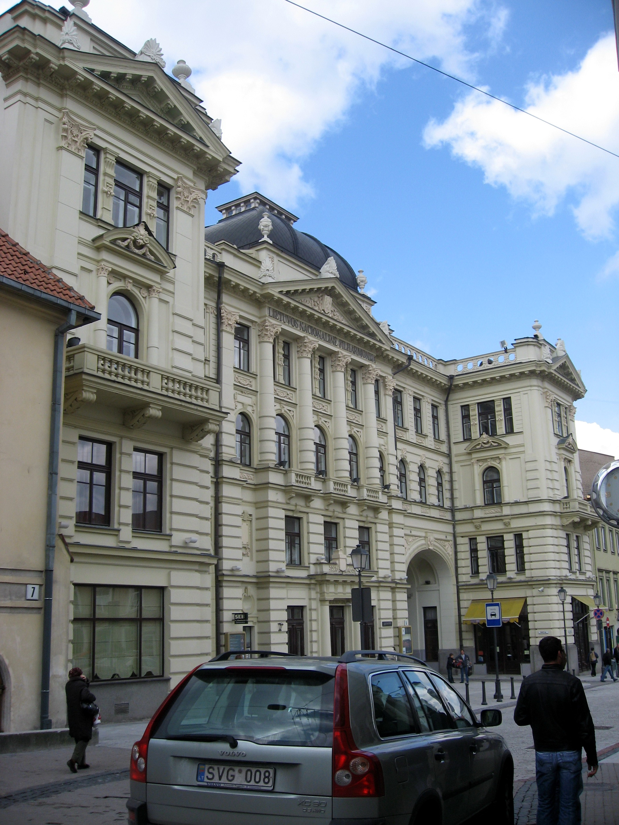 Litevská národní filharmonie